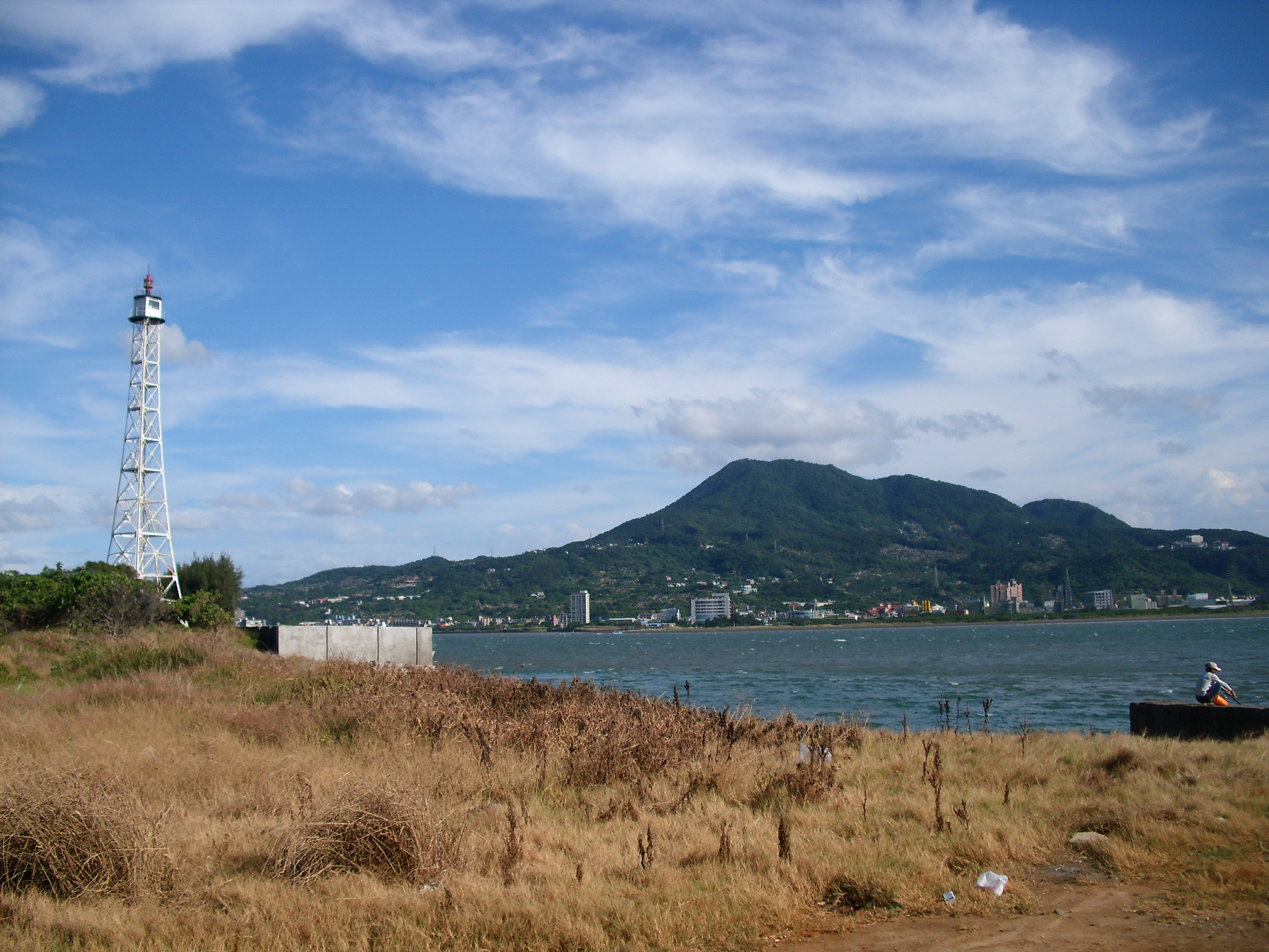 Bân-lâm-gú: 淡水港燈塔。